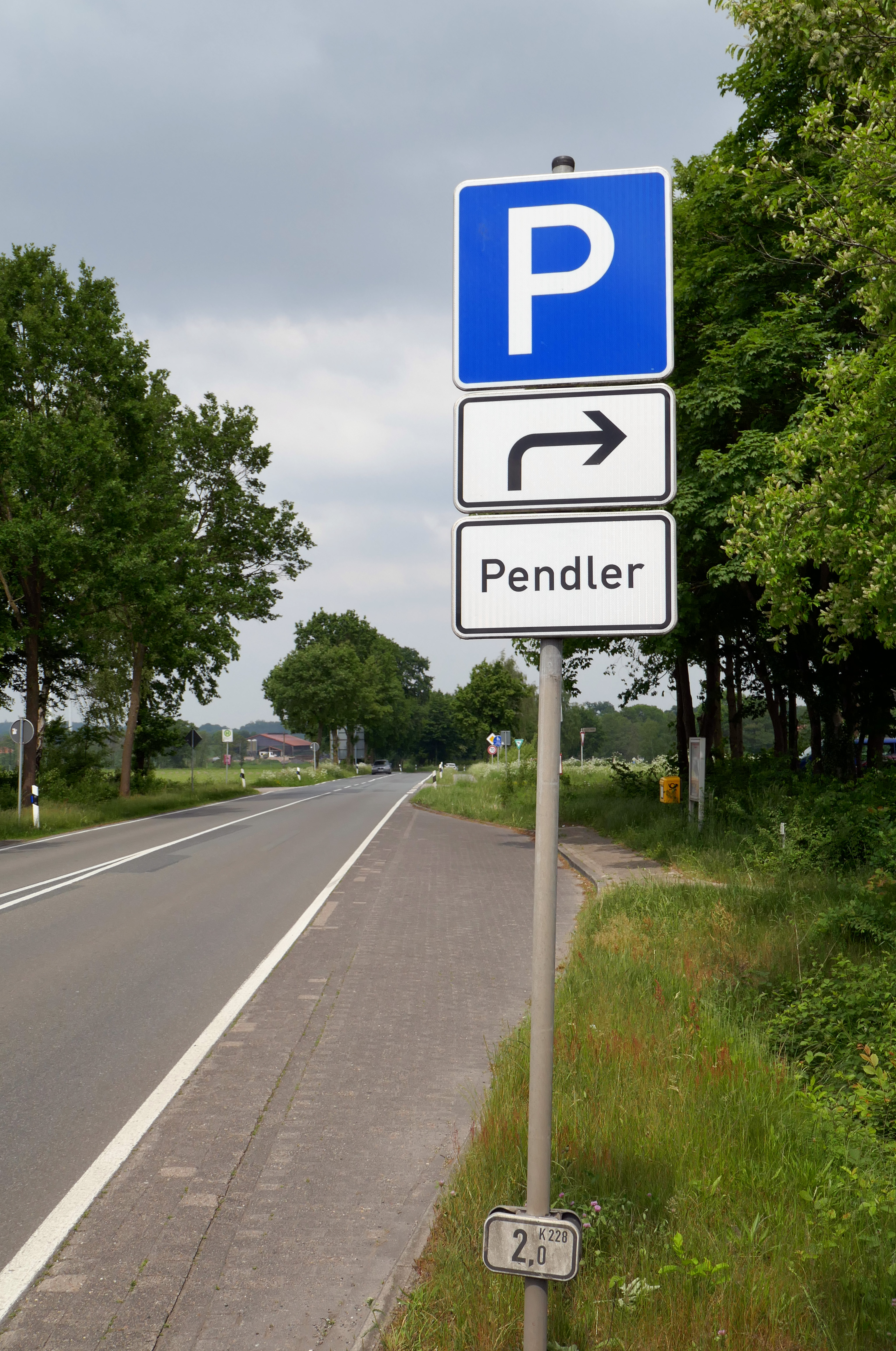 Zeichen 314 mit Zusatzschild Pendler